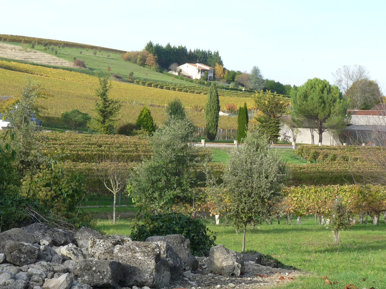 Vue depuis le prieuré, Bouteville, Charente, France. Cuesta du Campanien.